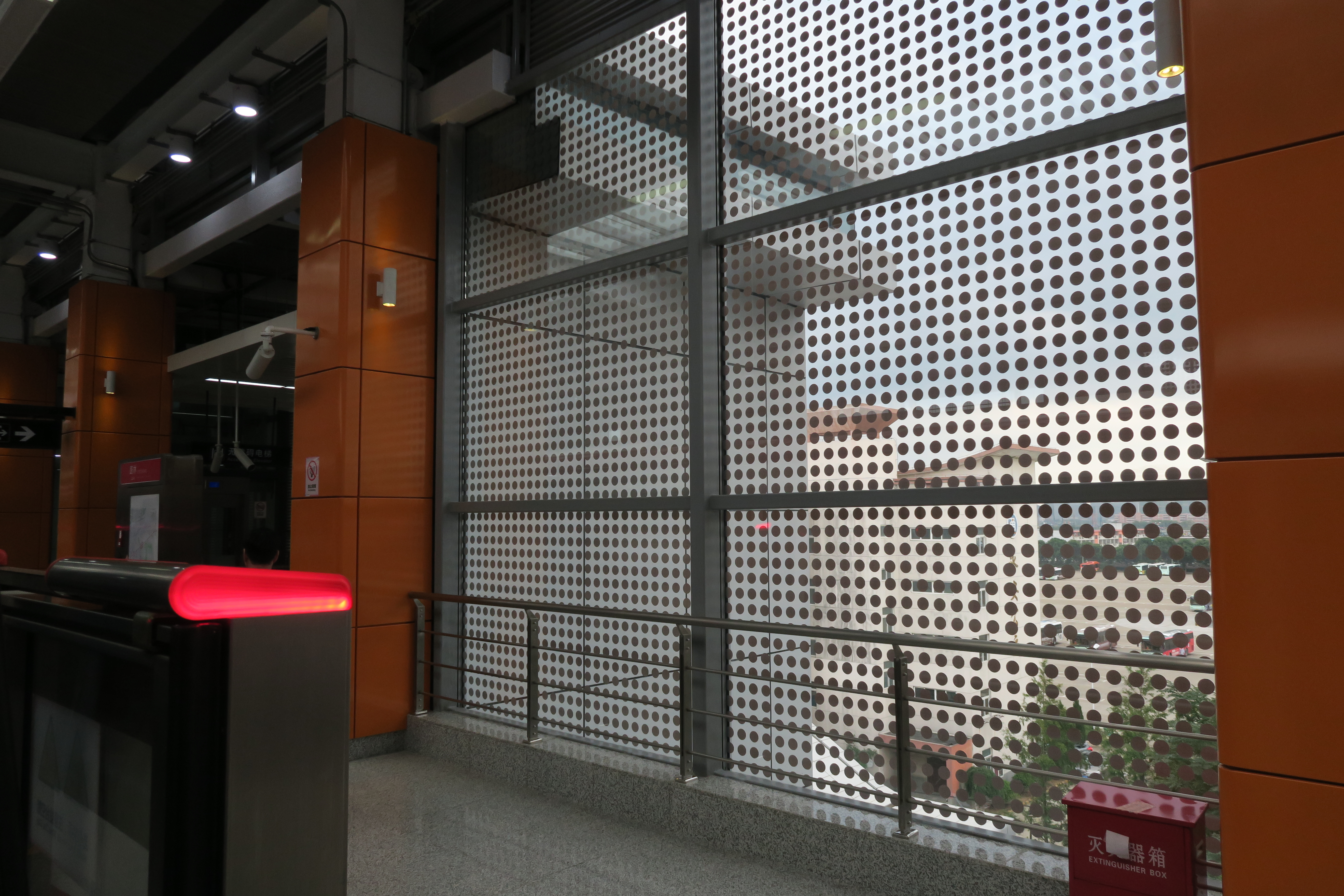 路林站站台